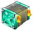 Eestor supercapacitor cell